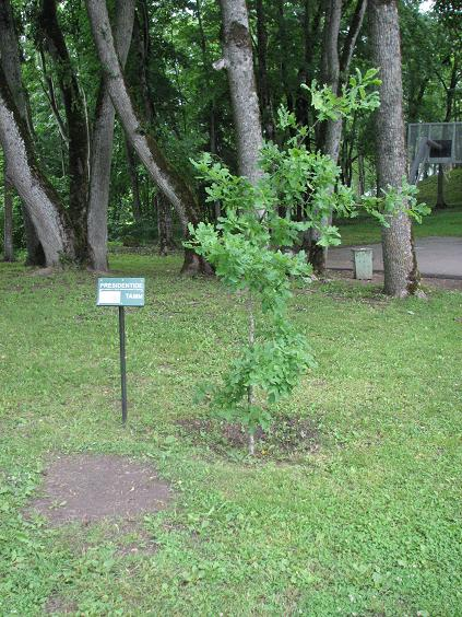 Presidentide tamm